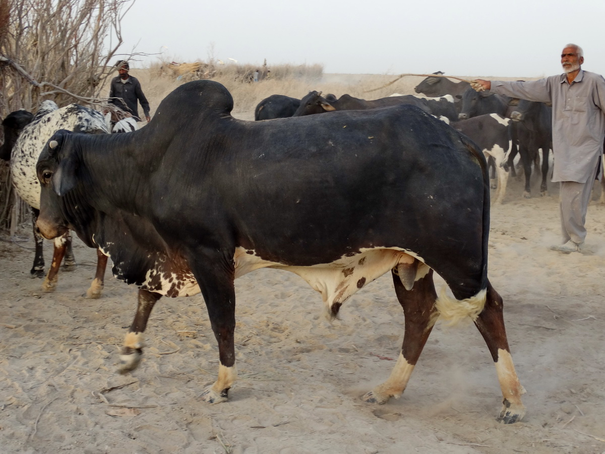 گاو اصیل سیستانی